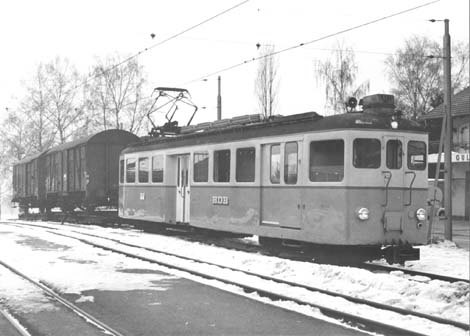 Rollschemelzug mit BDe 4/4 Nr. 11 der Bremgarten-Dietikon-Bahn.